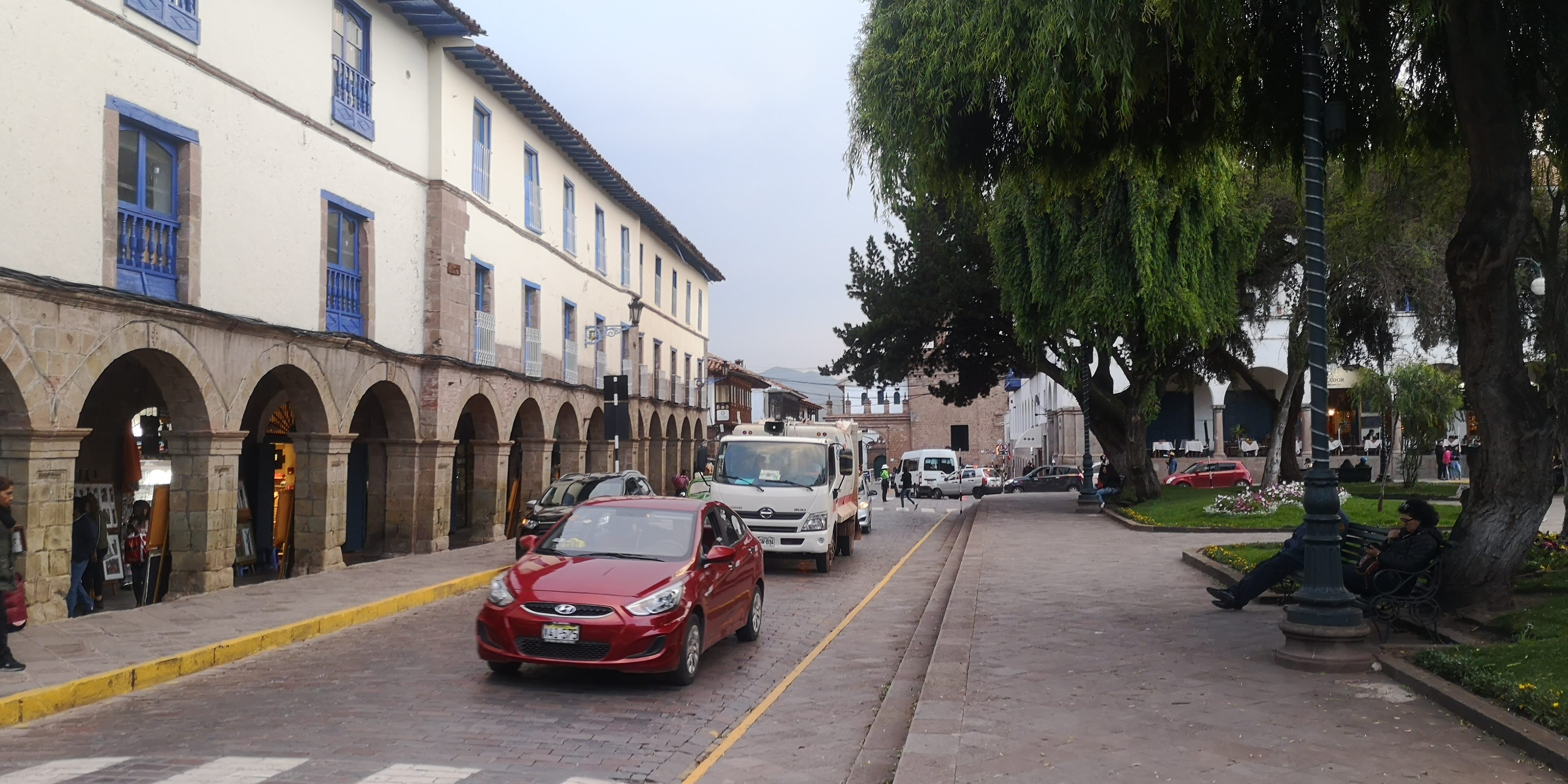 Vista del Portal Espinar en el Cusco, Perú. A la derecha está la Plaza Regocijo.